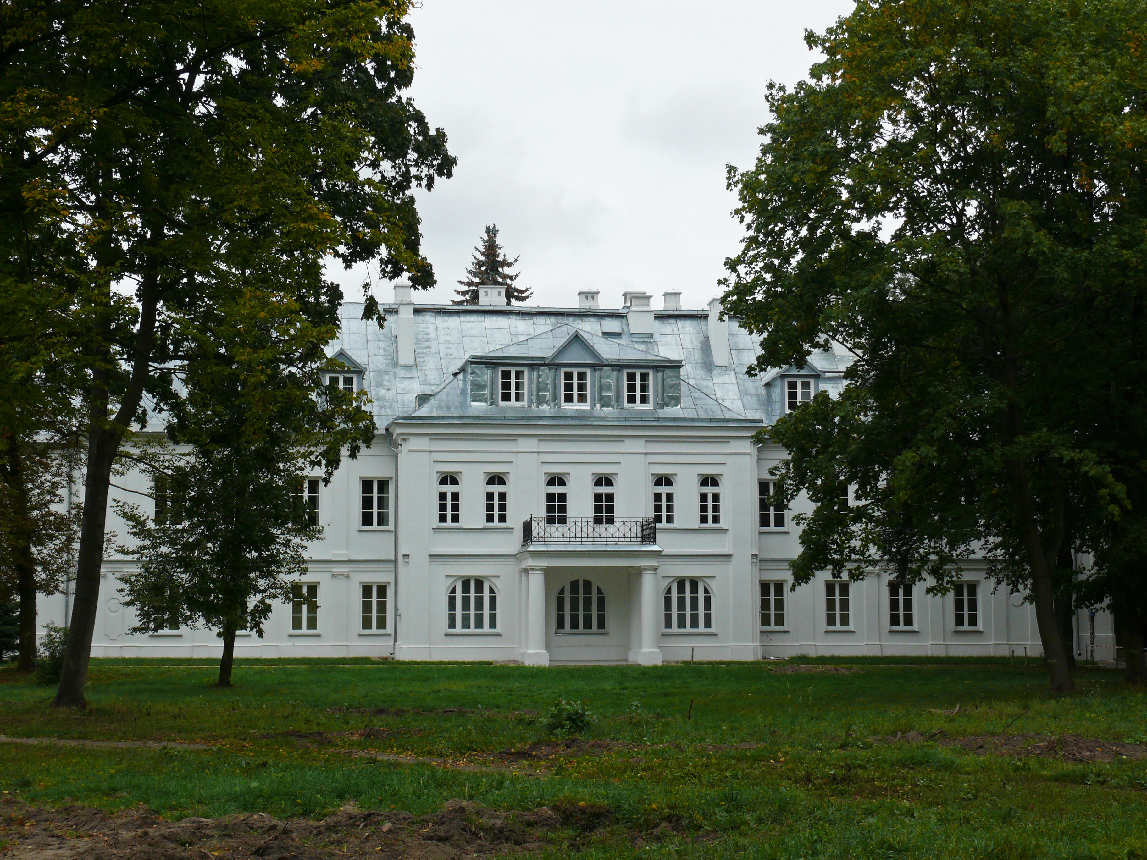 Zespół zamku Radziwiłłów (XVIIw.,XIXw.) - oficyna północno-wschodnia (biblioteka, tył) - Biała Podlaska, ul. Warszawska, woj. lubelskie, (Zabytek nr. A/134 z 28.09.1956 i z 31.12.1966)